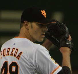 Giants poreda